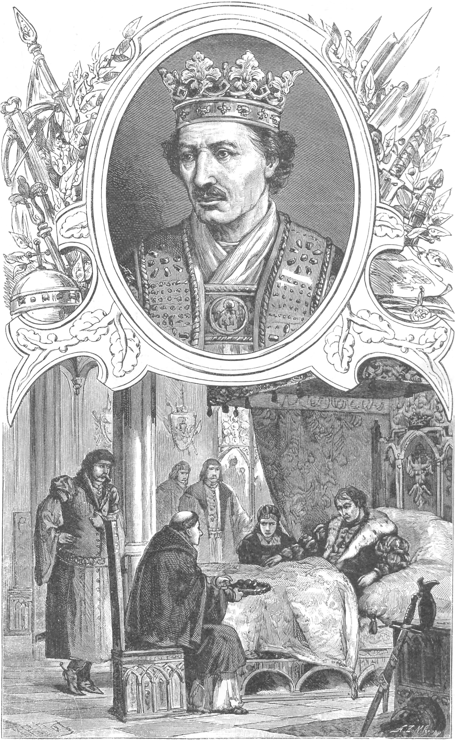 ilustracja z książki „Wizerunki książąt i królów polskich“